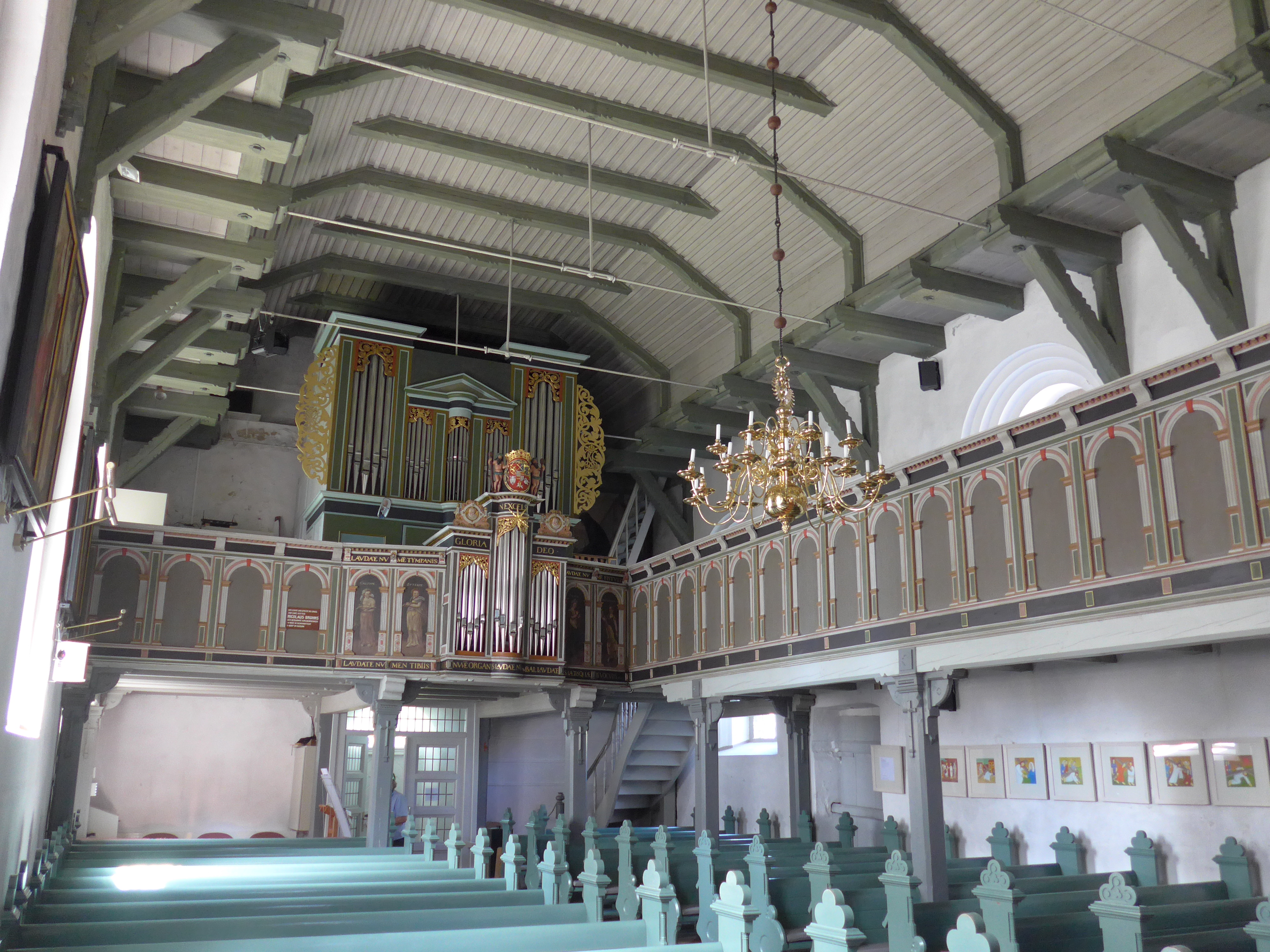 Schwabstedt, St. Jacobi, Innenansicht